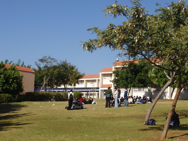 student in garden